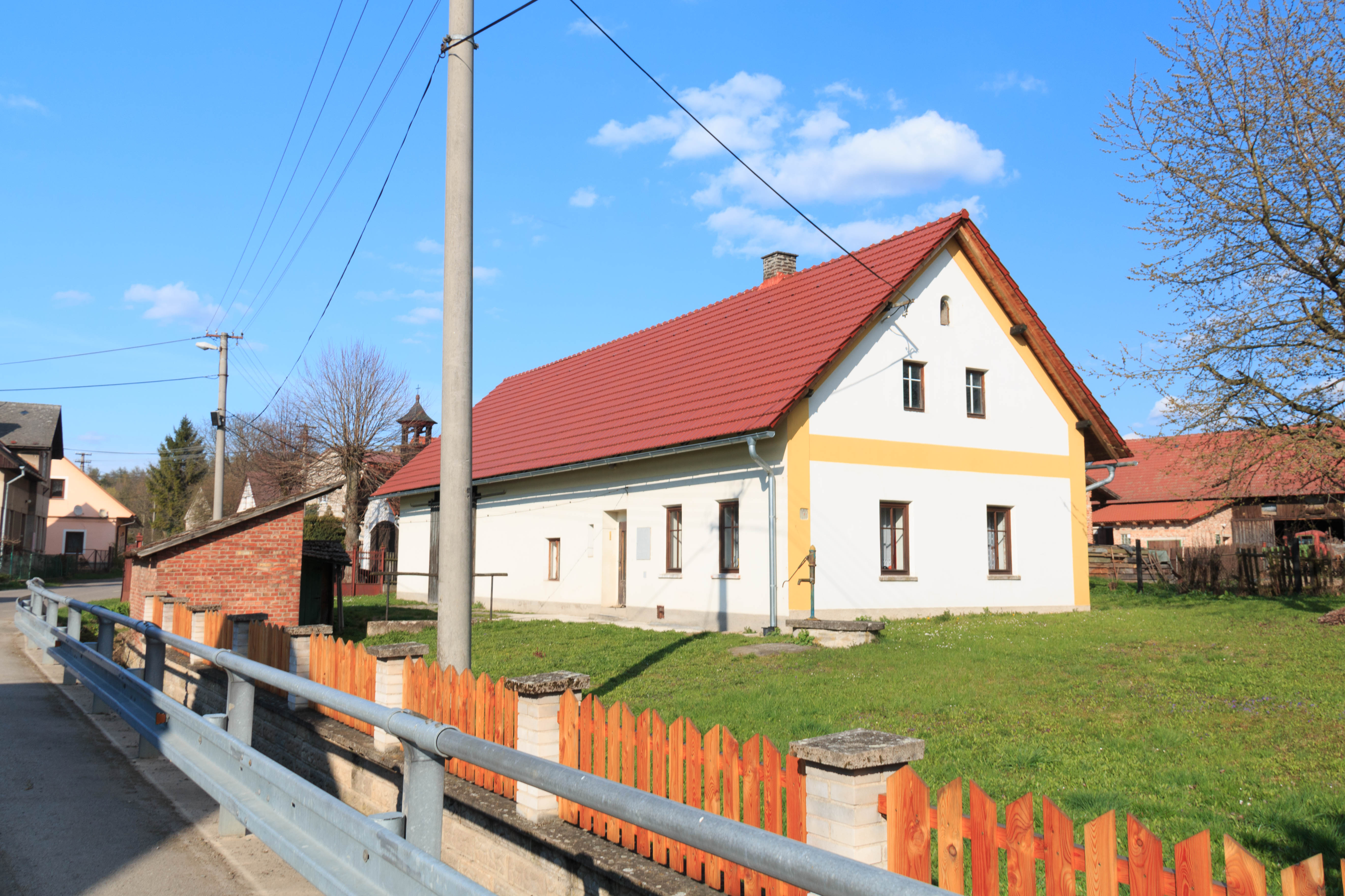 Kleny čp. 5